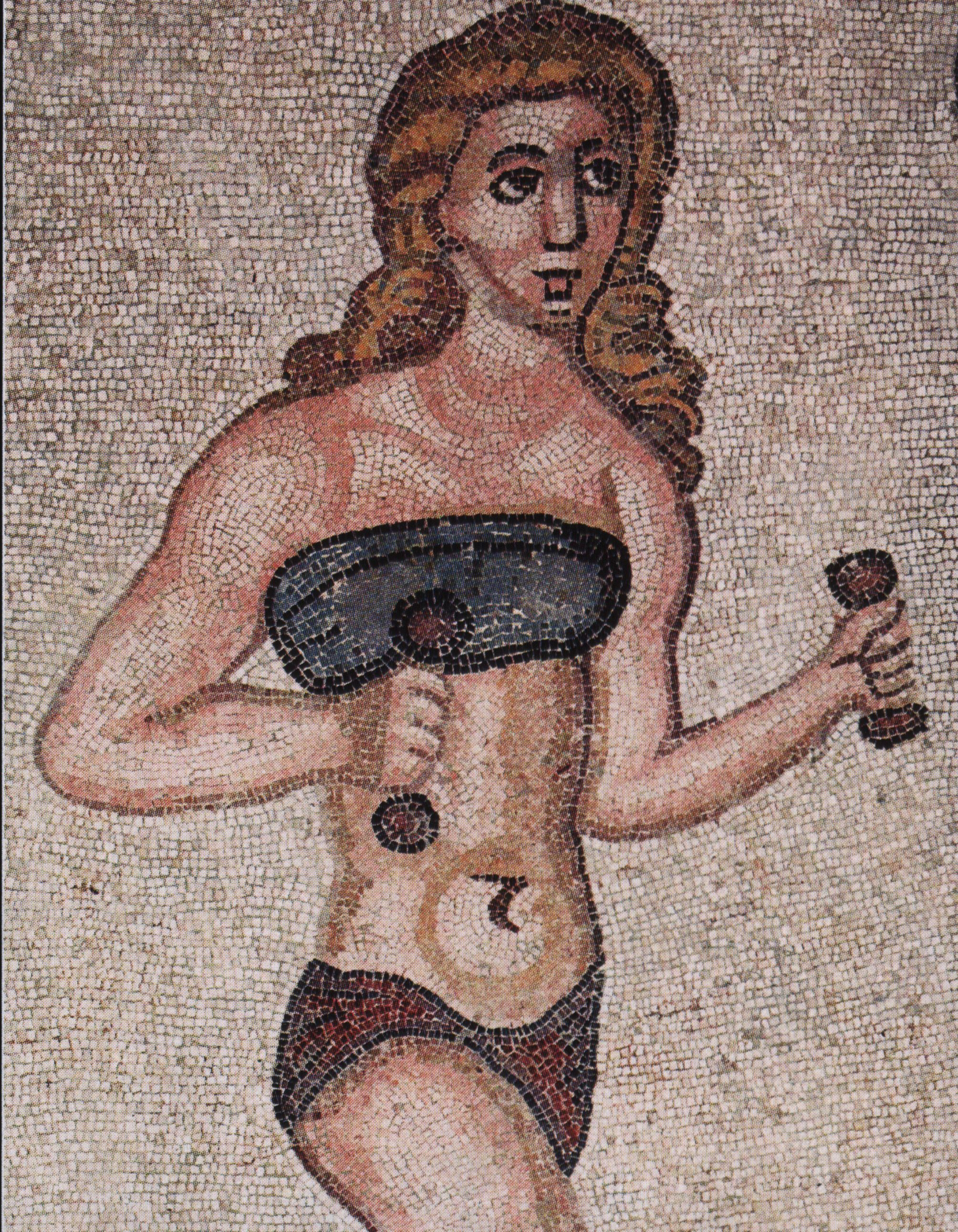 Jeune femme aux haltères - Mosaïque dans la Villa romaine du Casale.